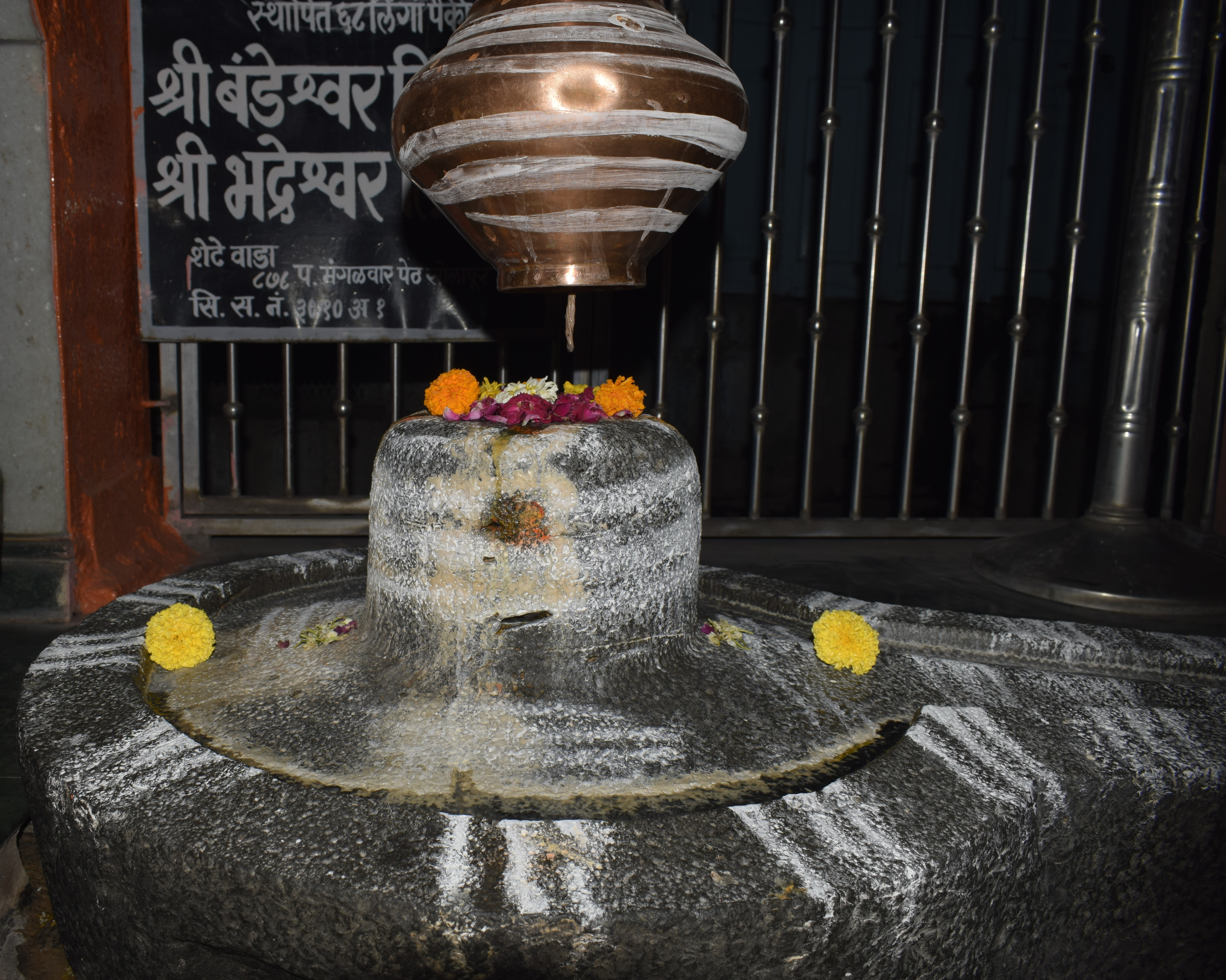 श्री भद्रेश्वर लिंग